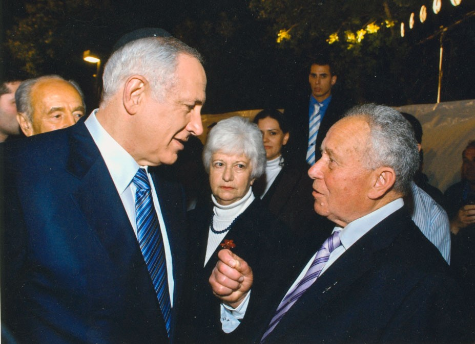 שמעון גרינהויז עם ראש הממשלה בנימין נתניהו בטקס הדלקת המשואות ביד ושם